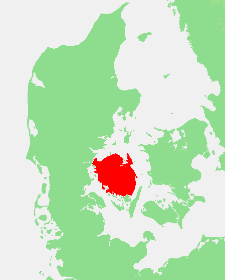 DK - Funen.PNG